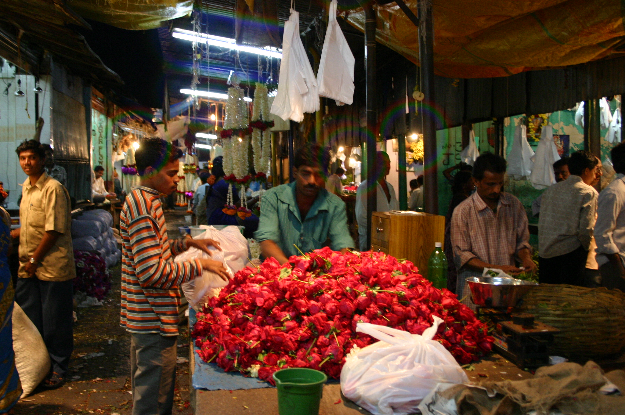 Mysore fruit and vegetable market at night